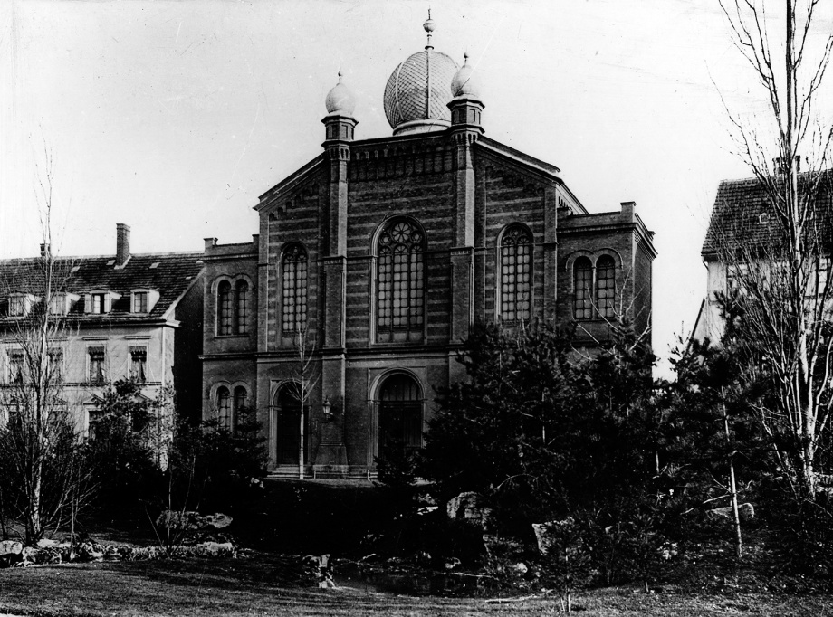 Große Synagoge Erfurt außen